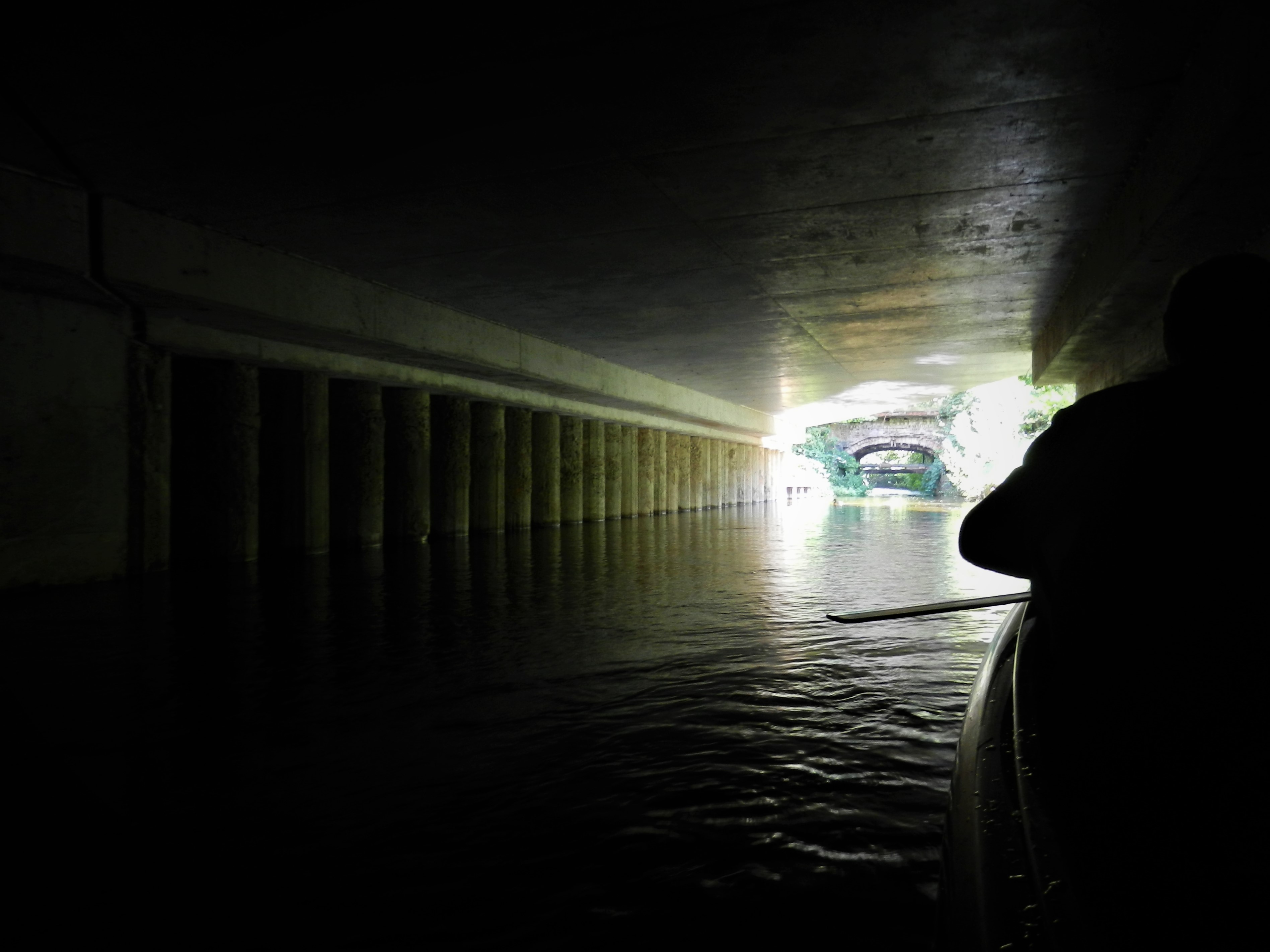 Aubach unter der Obotritenringbrücke in Schwerin 2011